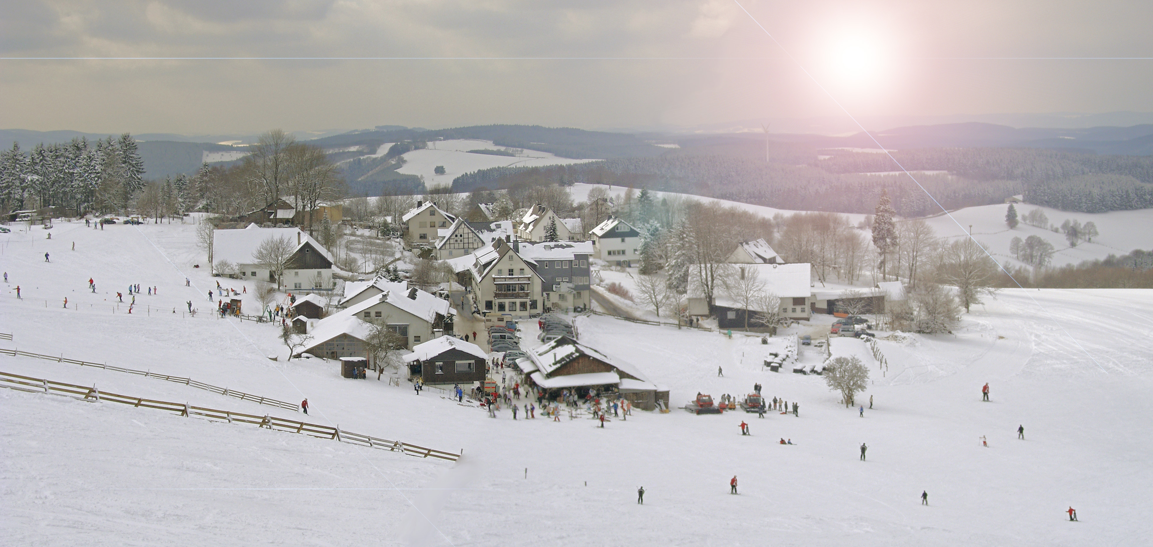 Winterpanorma Wildewiese